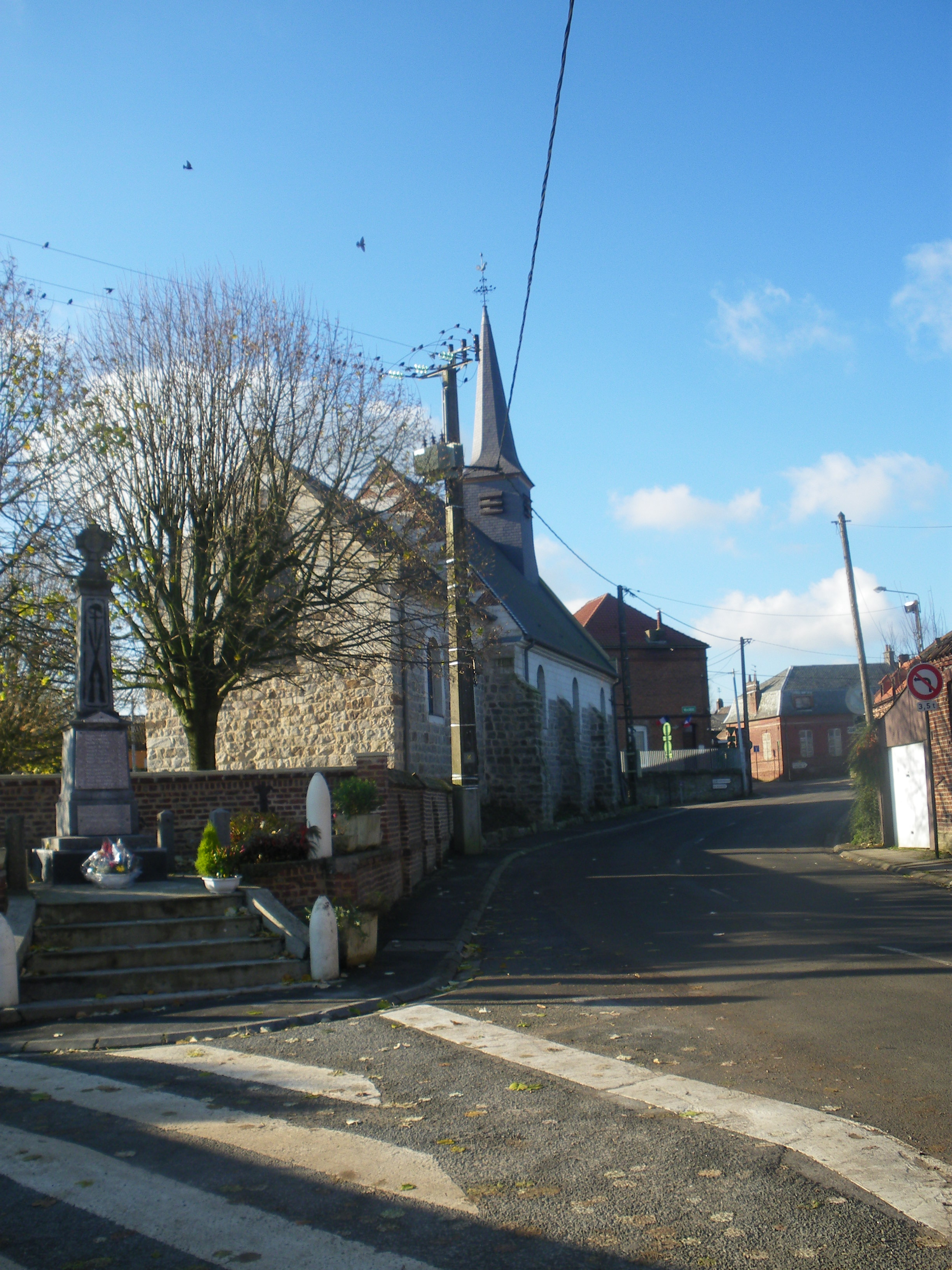 Vue du centre de la commune d'Hermin. De gauche à droite : le monument aux morts, l'église et la mairie.